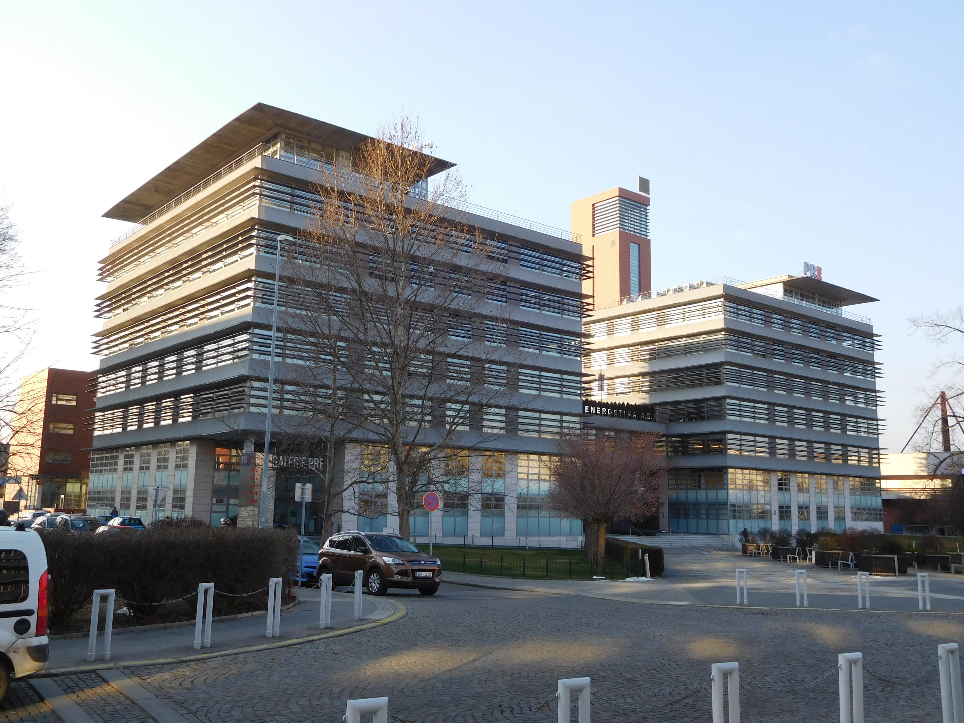 Praha - Vršovice, Na Hroudě 4, sídlo PRE